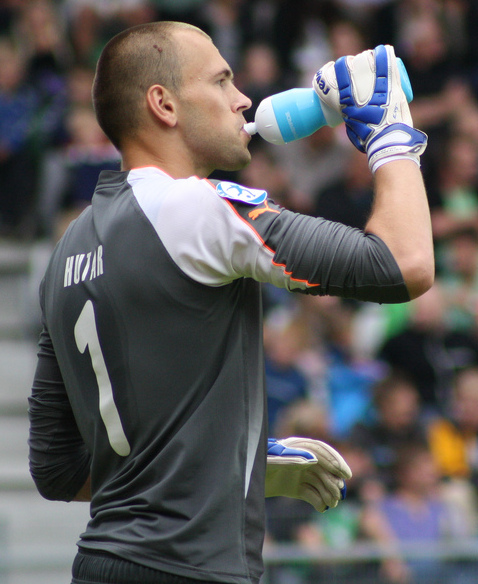 Alyaksandr Hutar